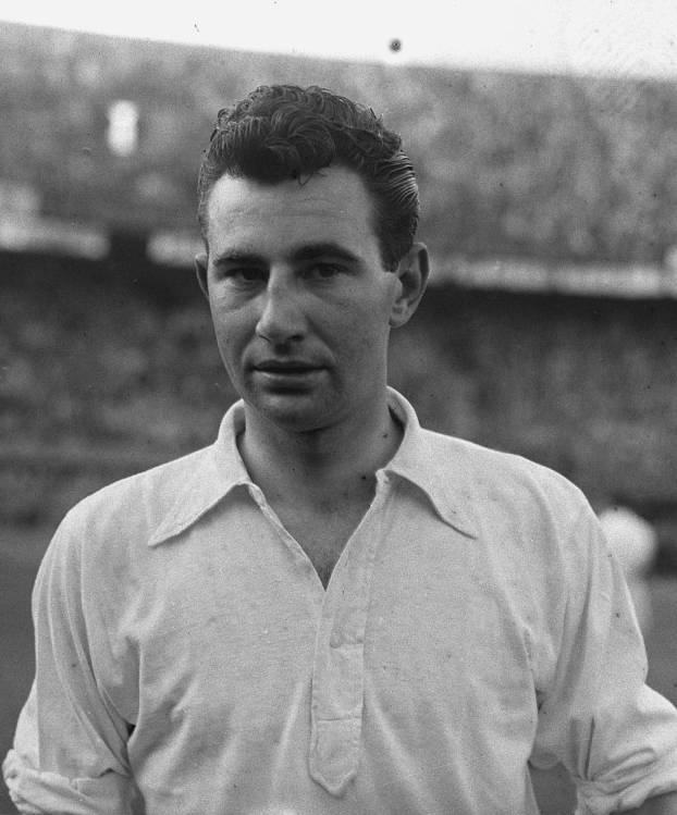 Wim Hendriks.